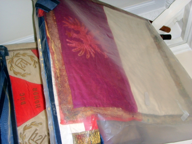 Eksponaty Instytutu im. Sikorskiego w Londynie